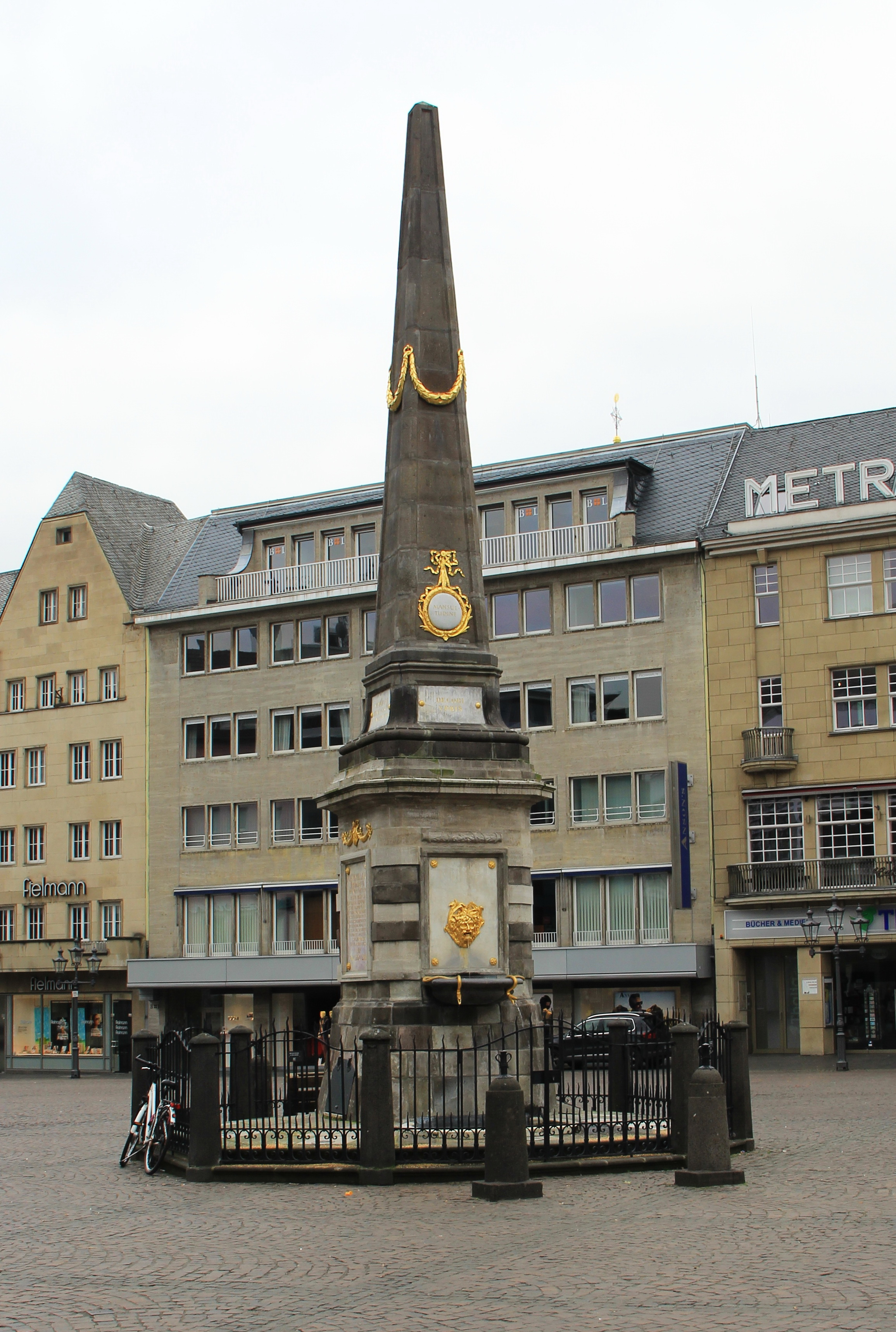 Fontainen-Obelisk auf dem Bonner Marktplatz.